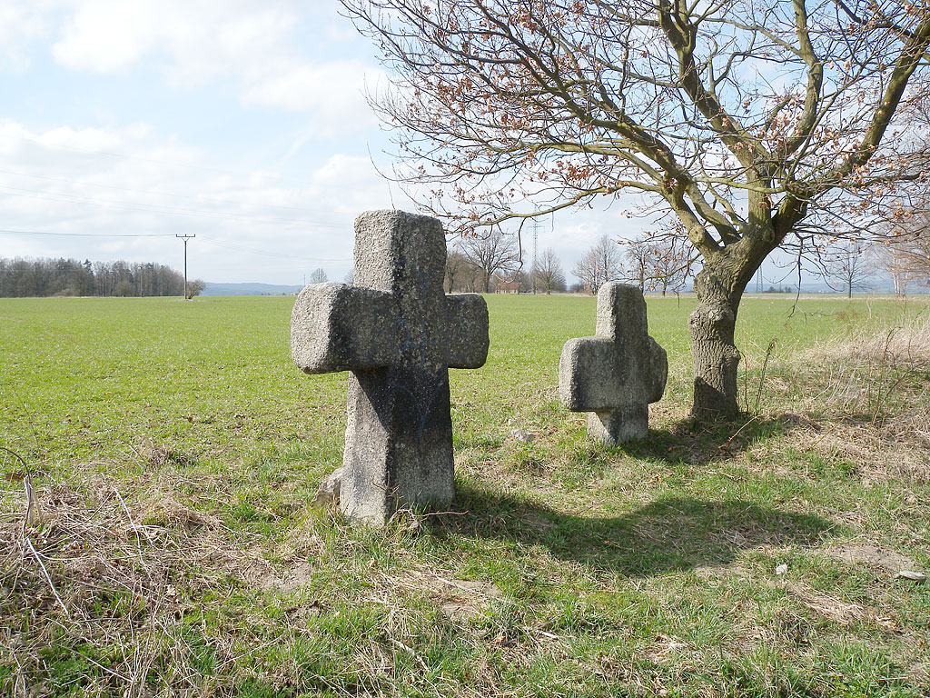 Dvojice smírčích křížů u obce Milhostov na Chebsku